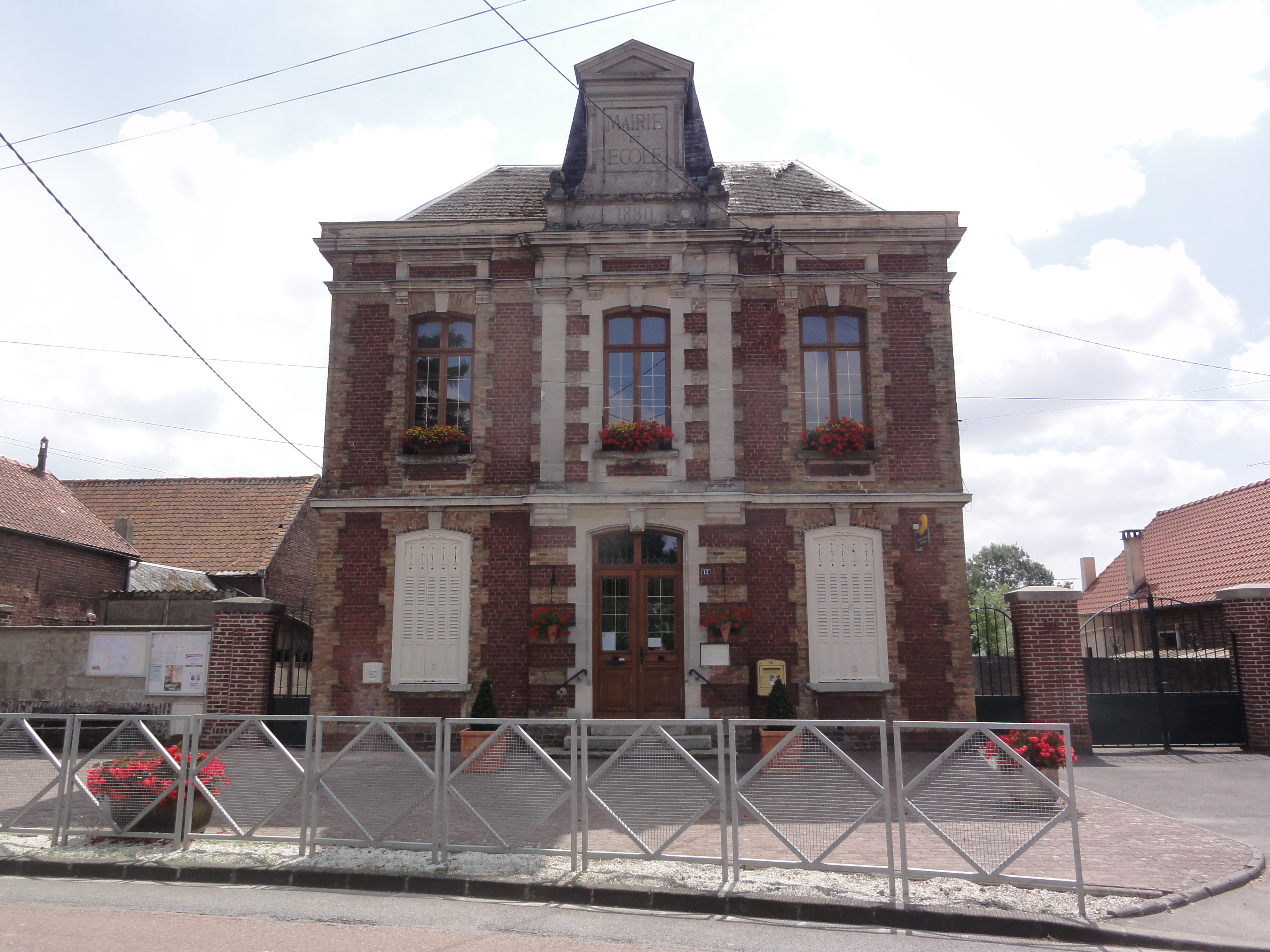 Serain (Aisne) mairie et école